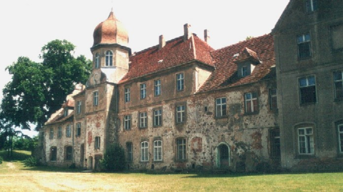 Festung Spantekow: Schloß / Manor-House